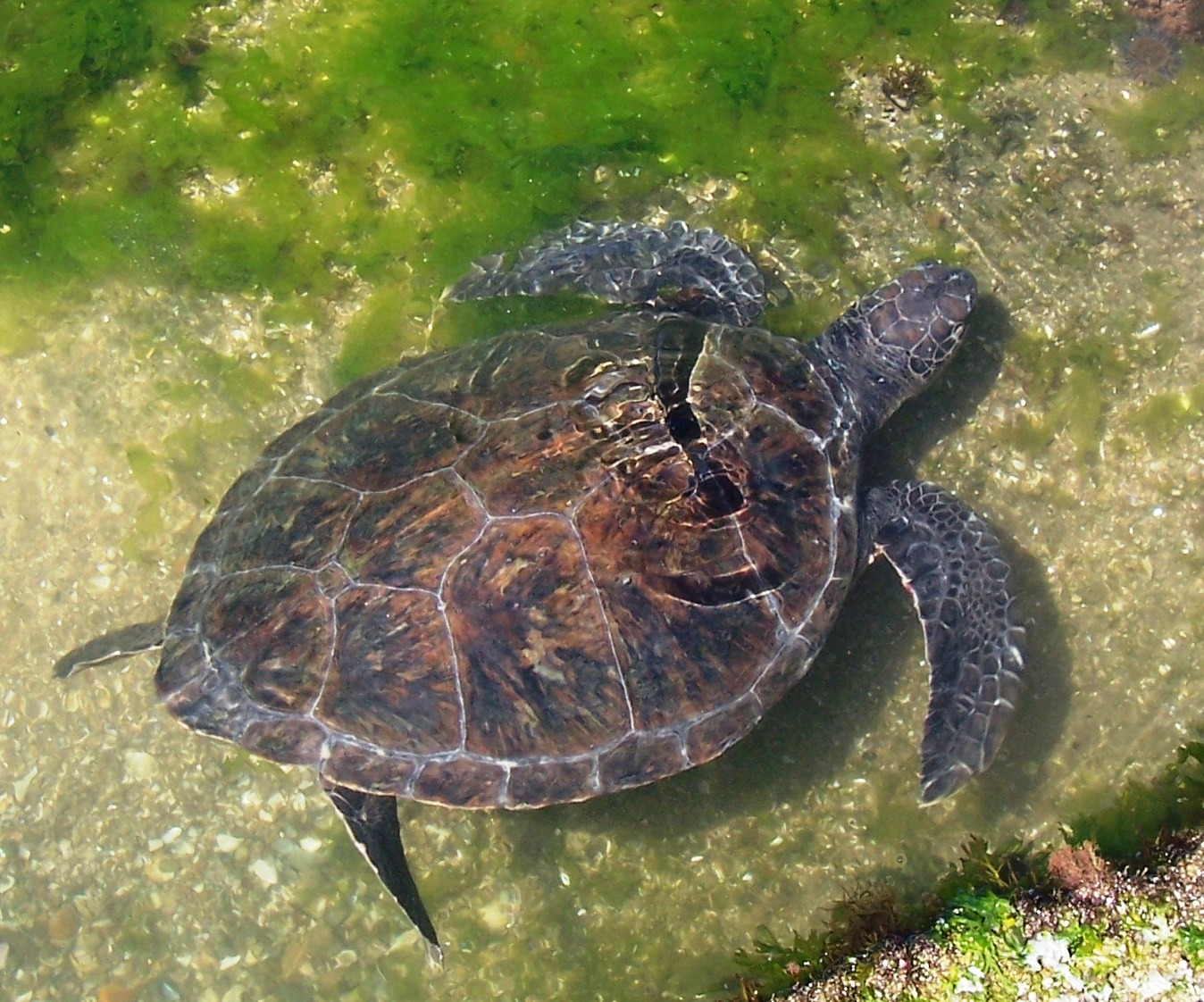 foto de tortuga verde en Uruguay